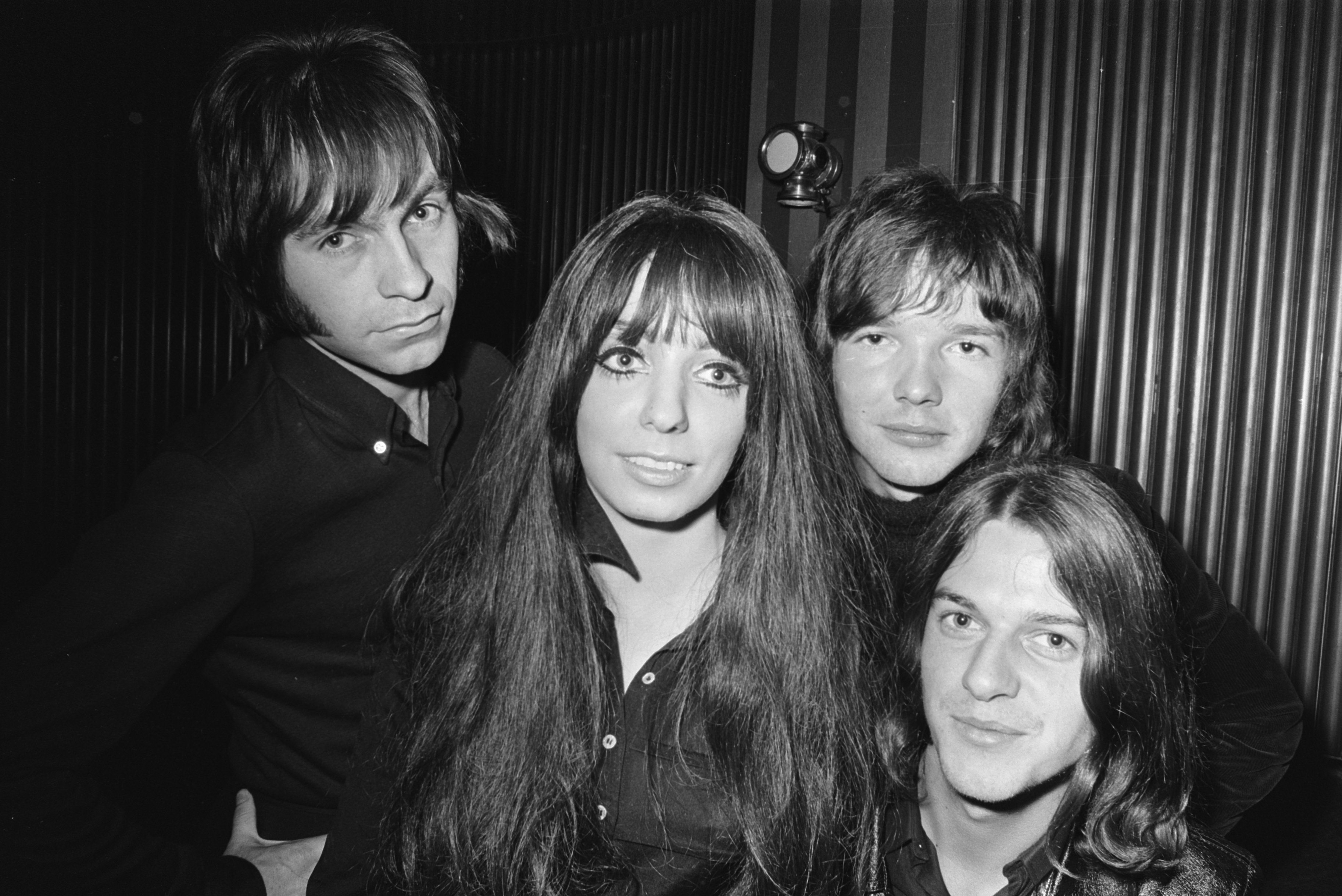 Collectie / Archief : Fotocollectie Anefo Reportage / Serie : [ onbekend ] Beschrijving : Popgroep "Shocking Blue" gaf persconferentie in verband met succes van plaat "Venus" (in USA nummer 1) Hilton Adam De Shocking Blue Datum : 27 januari 1970 Locatie : Amsterdam, Noord-Holland Trefwoorden : Popgroepen, persconferenties Persoonsnaam : Hilton Instellingsnaam : Shocking Blue Fotograaf : Evers, Joost / Anefo Auteursrechthebbende : Nationaal Archief Materiaalsoort : Negatief (zwart/wit) Nummer archiefinventaris : bekijk toegang 2.24.01.05 Bestanddeelnummer : 923-1956 Reacties Geplaatst door Maaike op 11 september 2012 - 16:48. Persoonsnamen: Mariska Veres; Robbie van Leeuwen; Klaasje van der Wal; Cor van der Beek